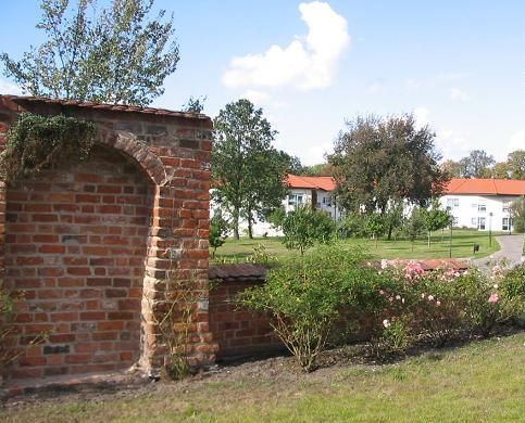 Kloster Lehnin, Brandenburg Teil der alten Klostermauer und neues Altenhilfezentrum Lothar Kreyssig Haus